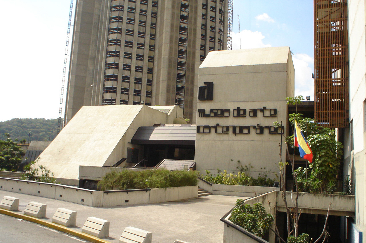 Museo de Arte Contemporáneo, Caracas, Venezuela Fecha: 22 febrero 2007 Autor: Pedro A. Rosales R.